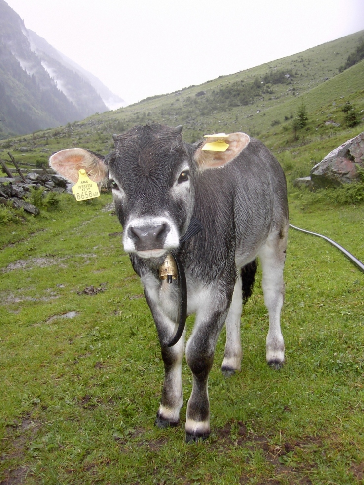 Tiroler Grauviehkalb im Pitztal, Tirol